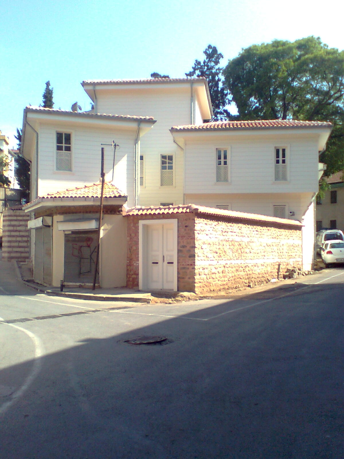 İskender Baba Tekkesi